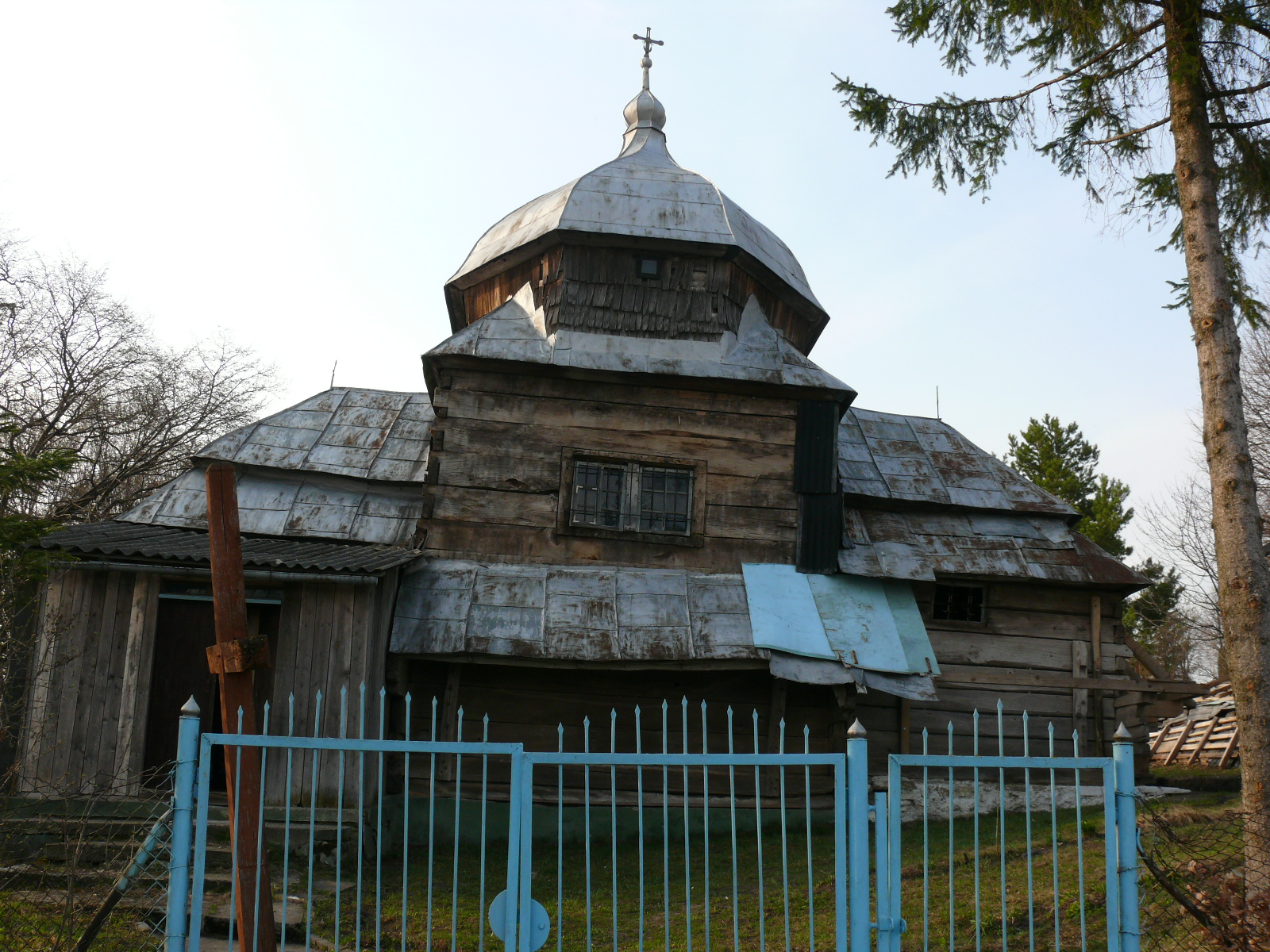 Стара церква в с. Лоні